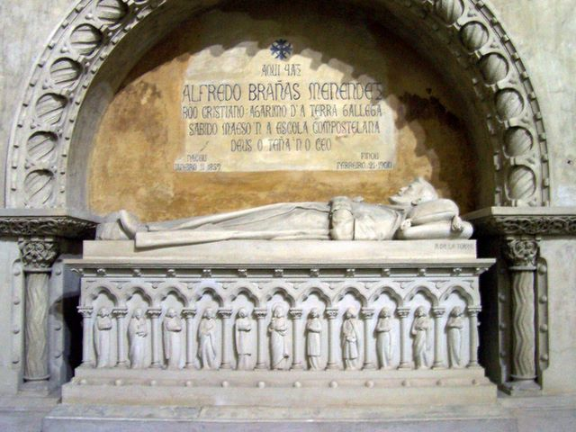 Cadaleito de Alfredo Brañas Menéndez no Panteón de Galegos Ilustres Licenza Brañas Categoría:Imaxes de sepulcros de San Domingos de Bonaval